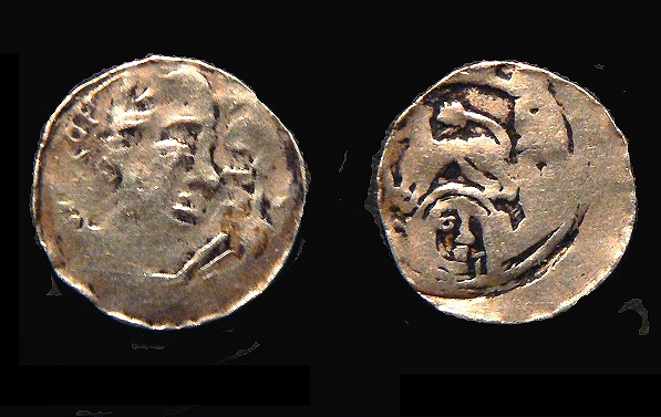 Denier d'argent de Raoul de Zähringen.